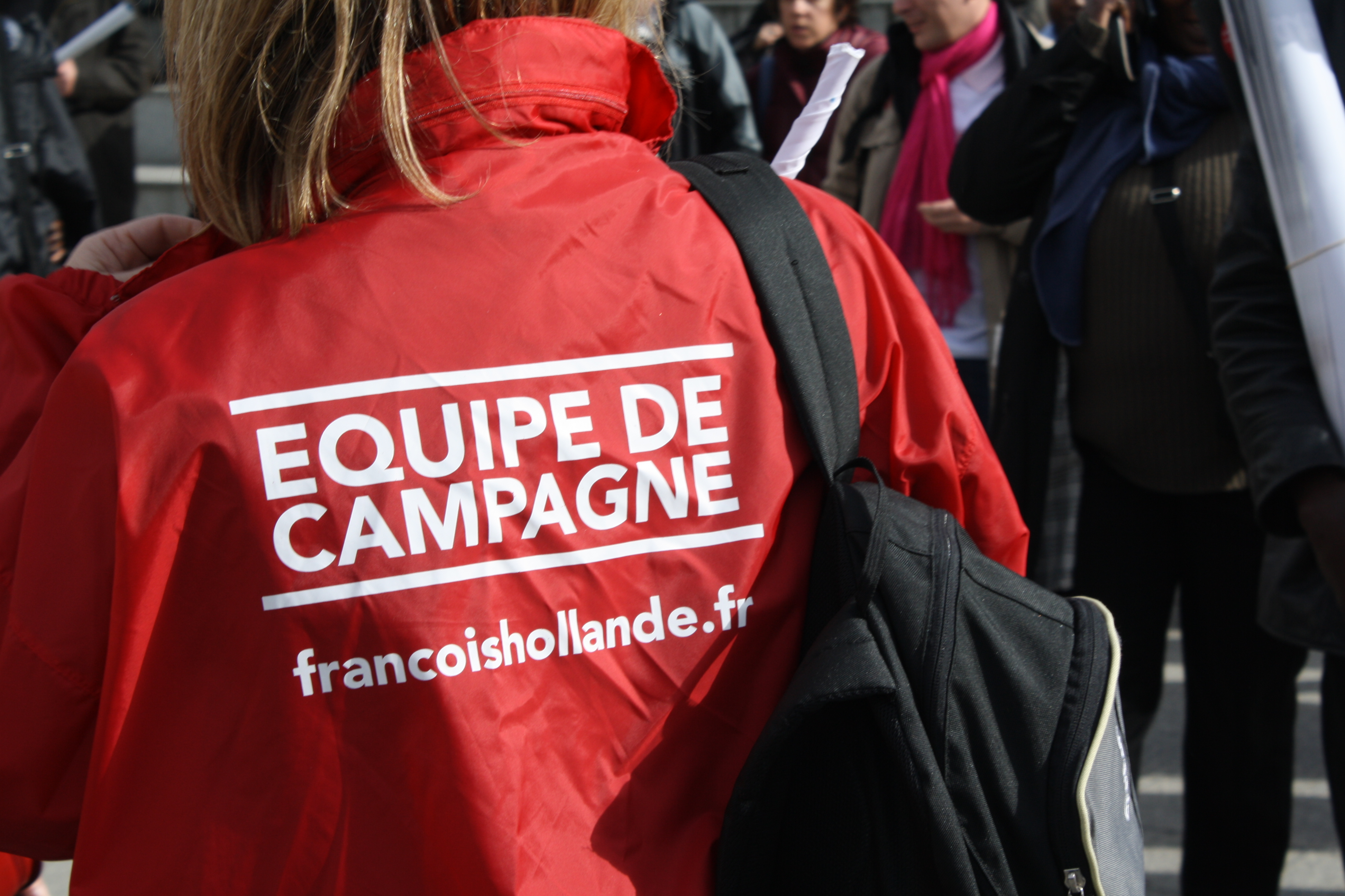 Dernier meeting parisien pour François Hollande une semaine avant le second tour de l'élection présidentielle, le 29 avril 2012, à Bercy. Quelques instantanés du côté des militants.